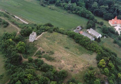 Ruino de fortikaĵo en Bánd.